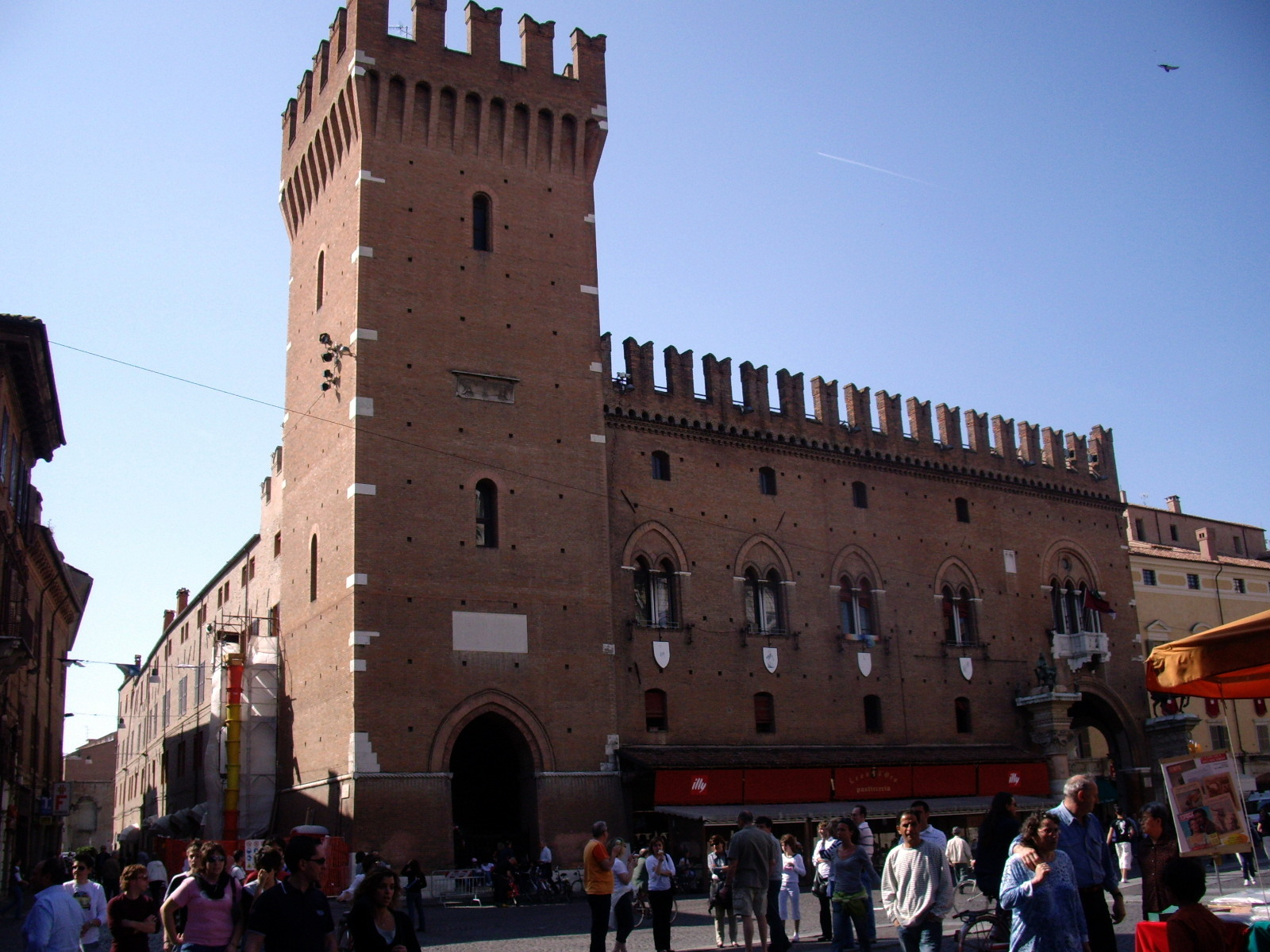 Ferrara. Palazzo Municipale, vista general